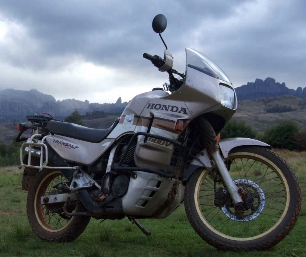 Honda Transalp im Andringitra Nationalpark in Madagaskar, mehr zur Reise auf